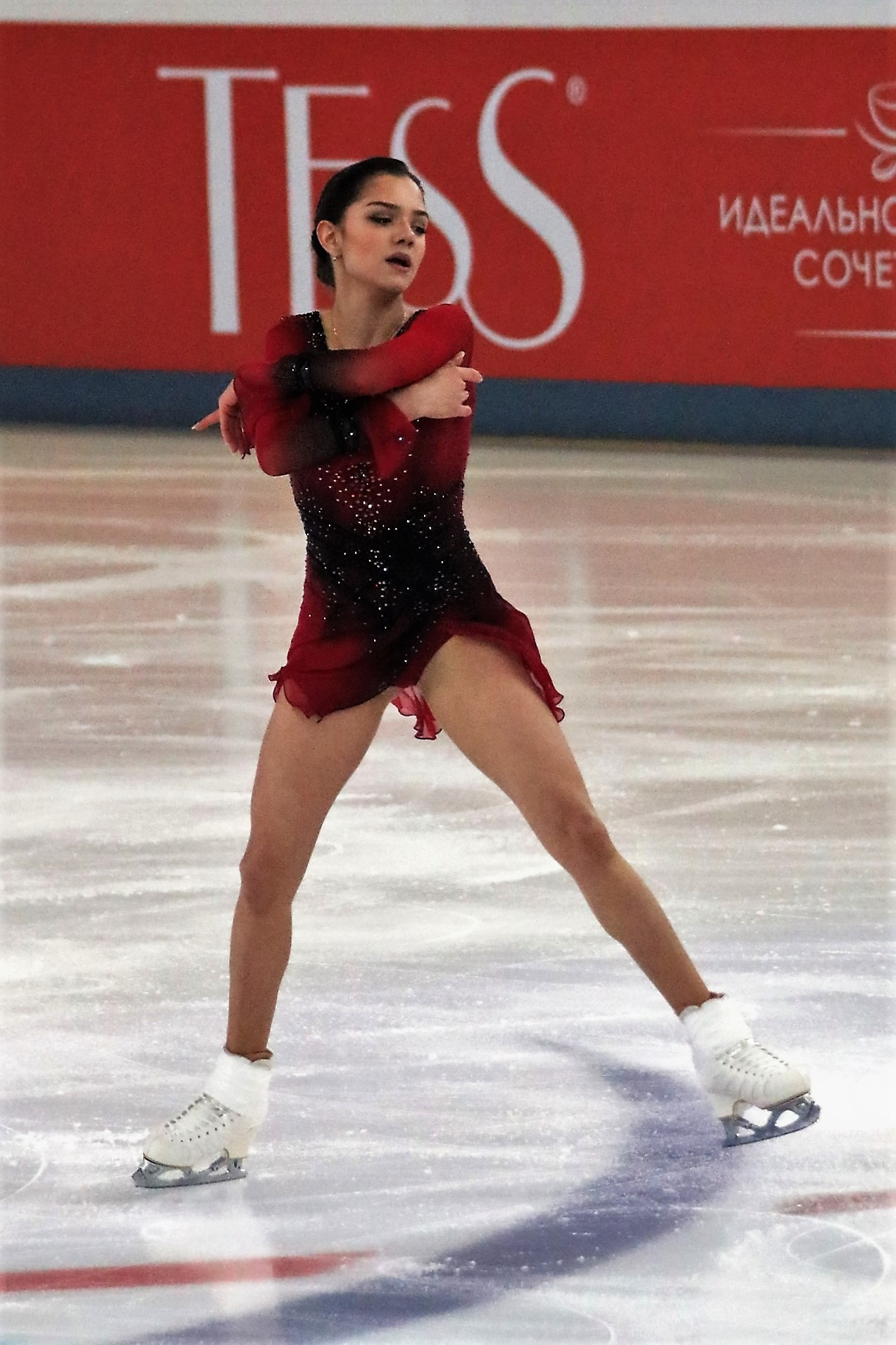 Евгения Медведева на чемпионате России по фигурному катанию на коньках 2019